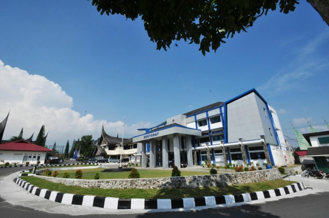 Rektorat ISI Padangpanjang